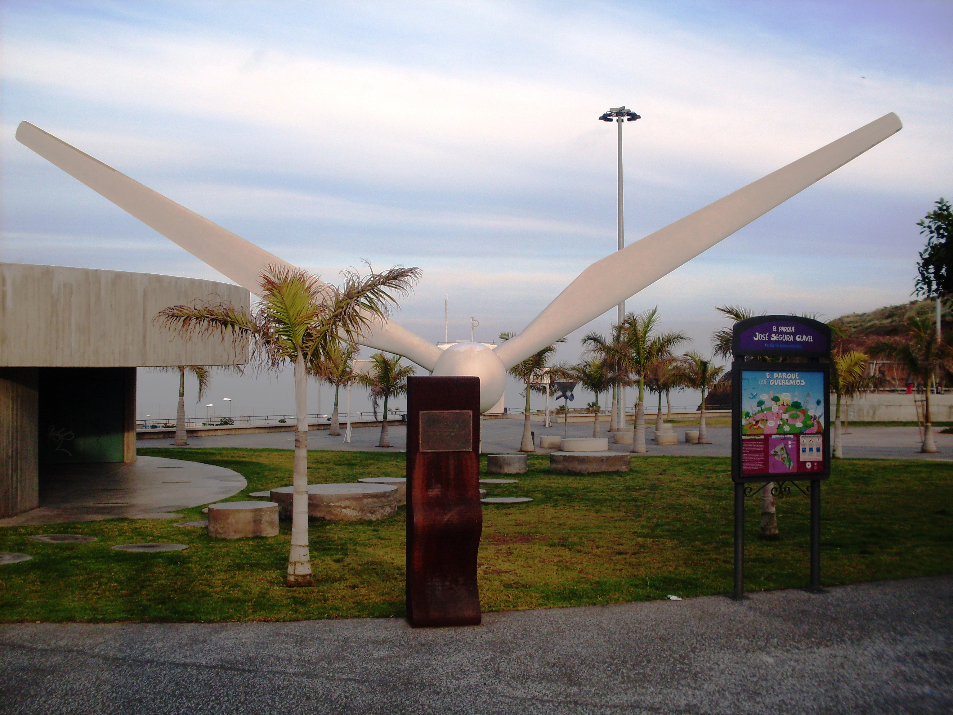 Interior del Parque José Segura Clavell, situado junto a la carretera La Cuesta-Taco (frente a la parada del tranvía "Ingenieros") en San Cristóbal de La Laguna.